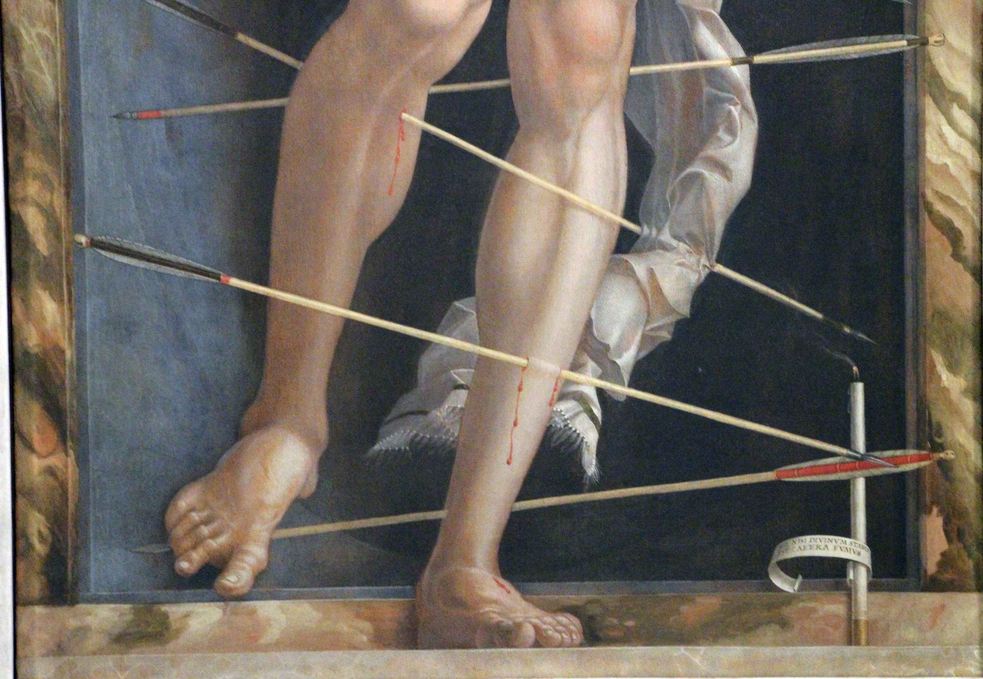 Galleria G. Franchetti alla Ca' d'Oro - MIBAC The making of this document was supported by Wikimedia CH. (Submit your project!) For all the files concerned, please see the category Supported by Wikimedia CH. This is a photo of a monument which is part of cultural heritage of Italy.